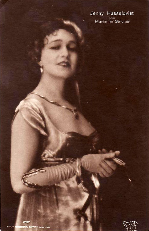 Jenny Hasselquist som Marianne Sinclair i Gösta Berlings saga